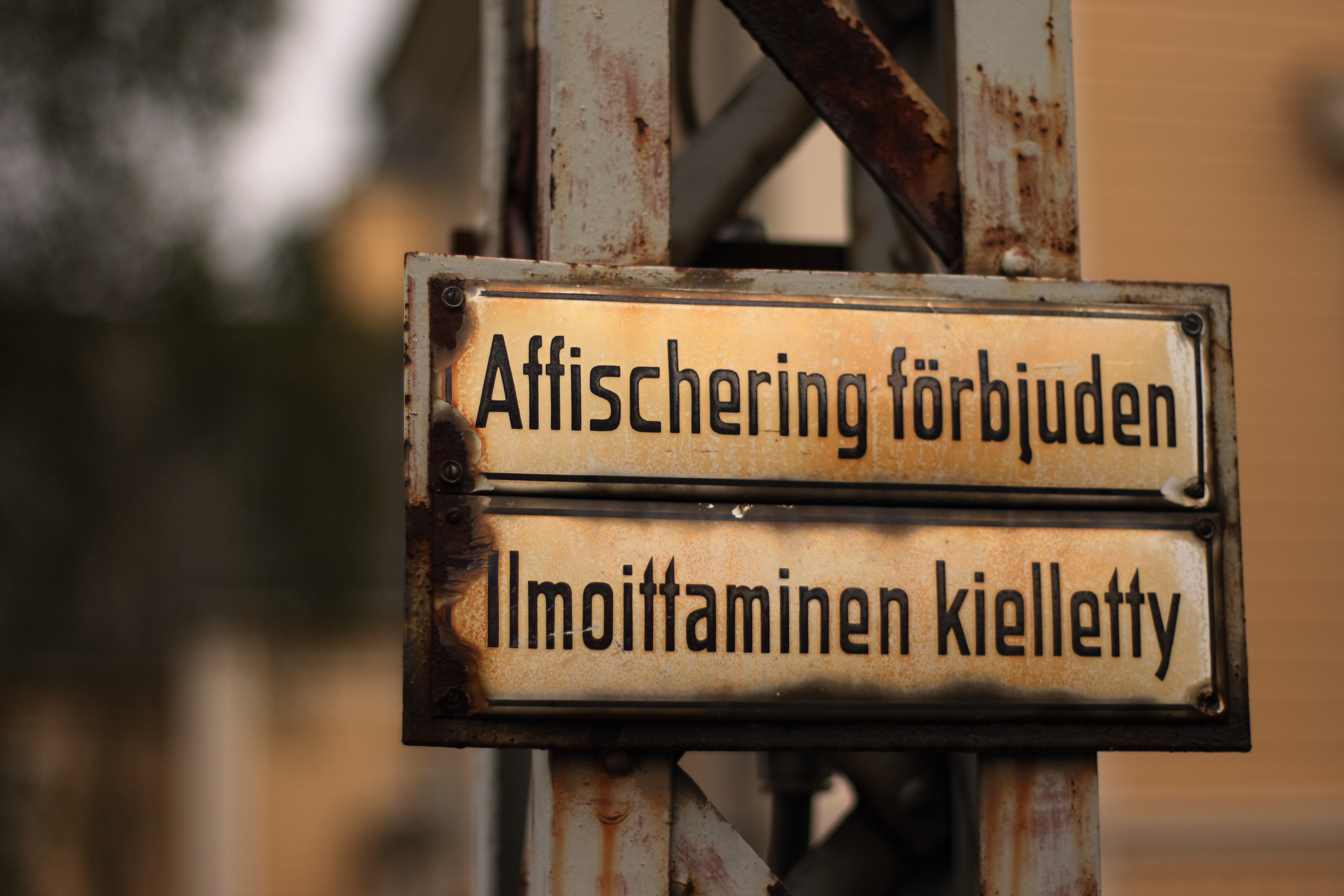 A bilingual "No Bill Posting" (Swedish: "Affischering förbjuden"; Finnish: "Ilmoittaminen kielletty") sign in Pietarsaari, Finland.